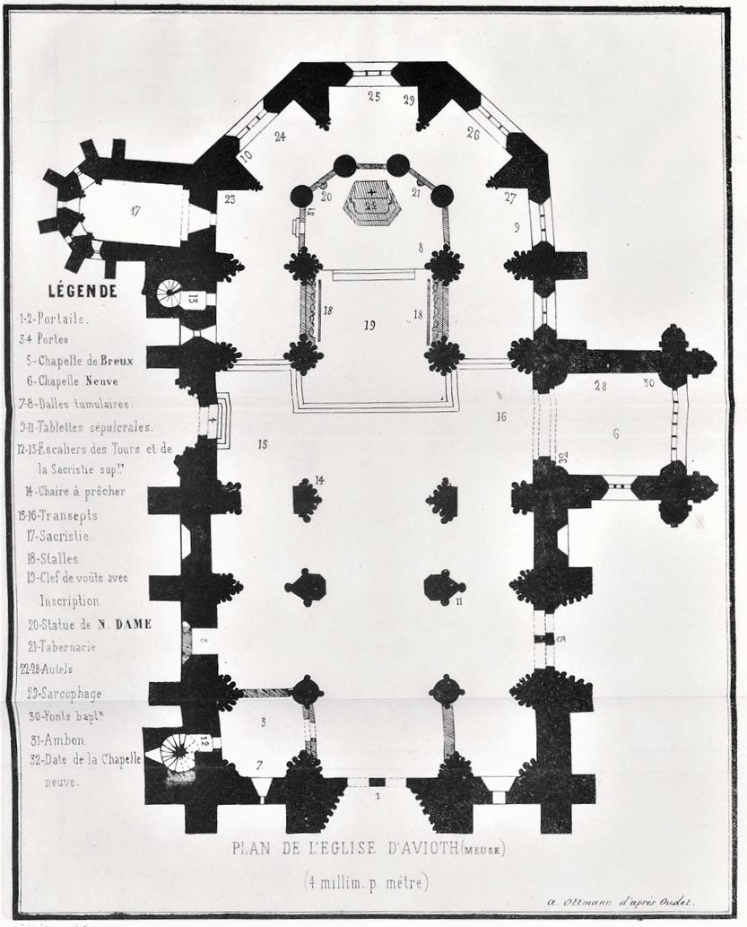 Avioth - Plan de la basilique Notre-Dame - A. Ottmann This image comes from Gallica Digital Library and is available under the digital ID bpt6k65168328/f159.image This tag does not indicate the copyright status of the attached work. A normal copyright tag is still required. See Commons:Licensing.